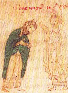 Roger II. Sicilský a papež Kalixtus II.